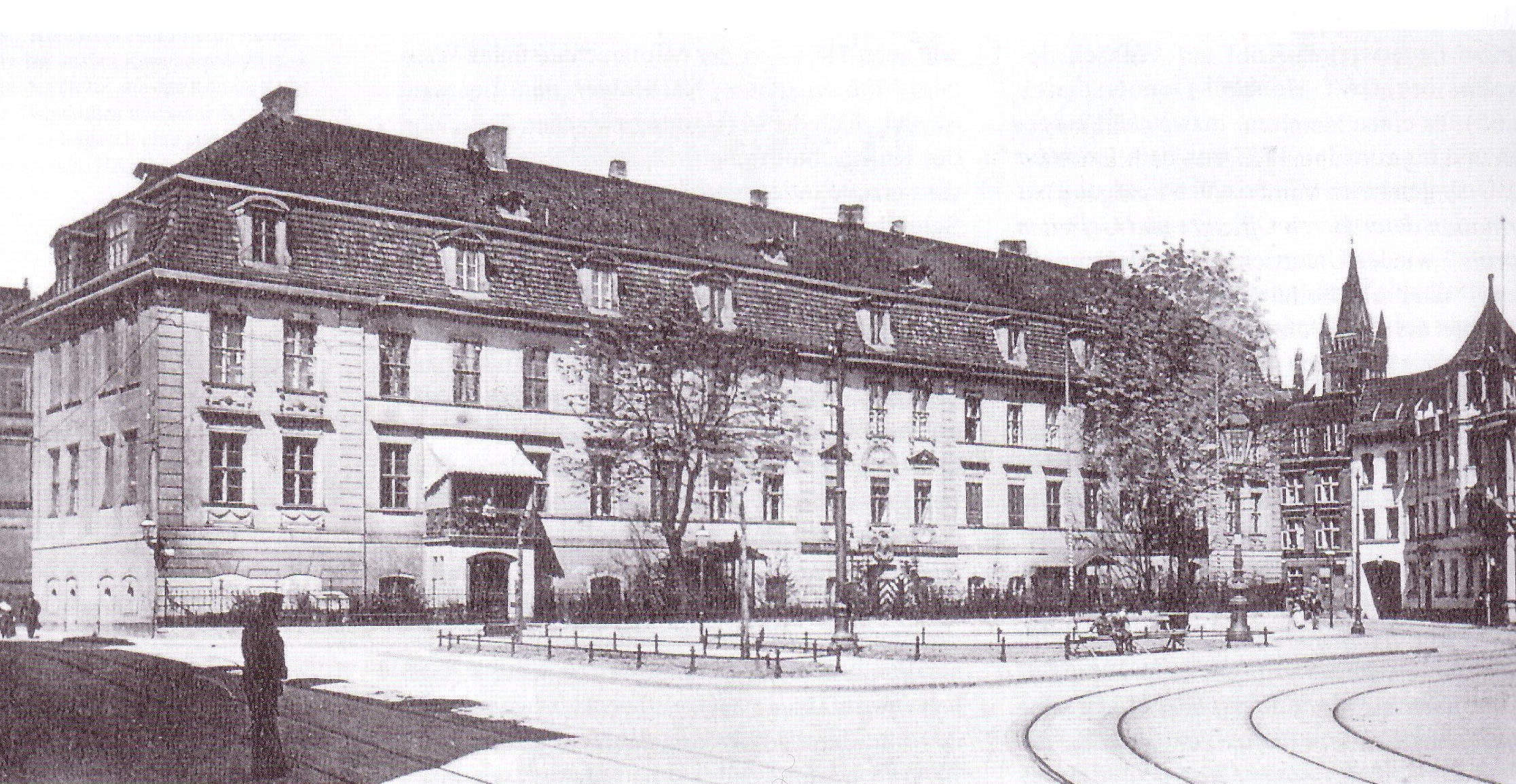 Gebäude der Reichsbank-Hauptstelle in Königsberg i. Pr.